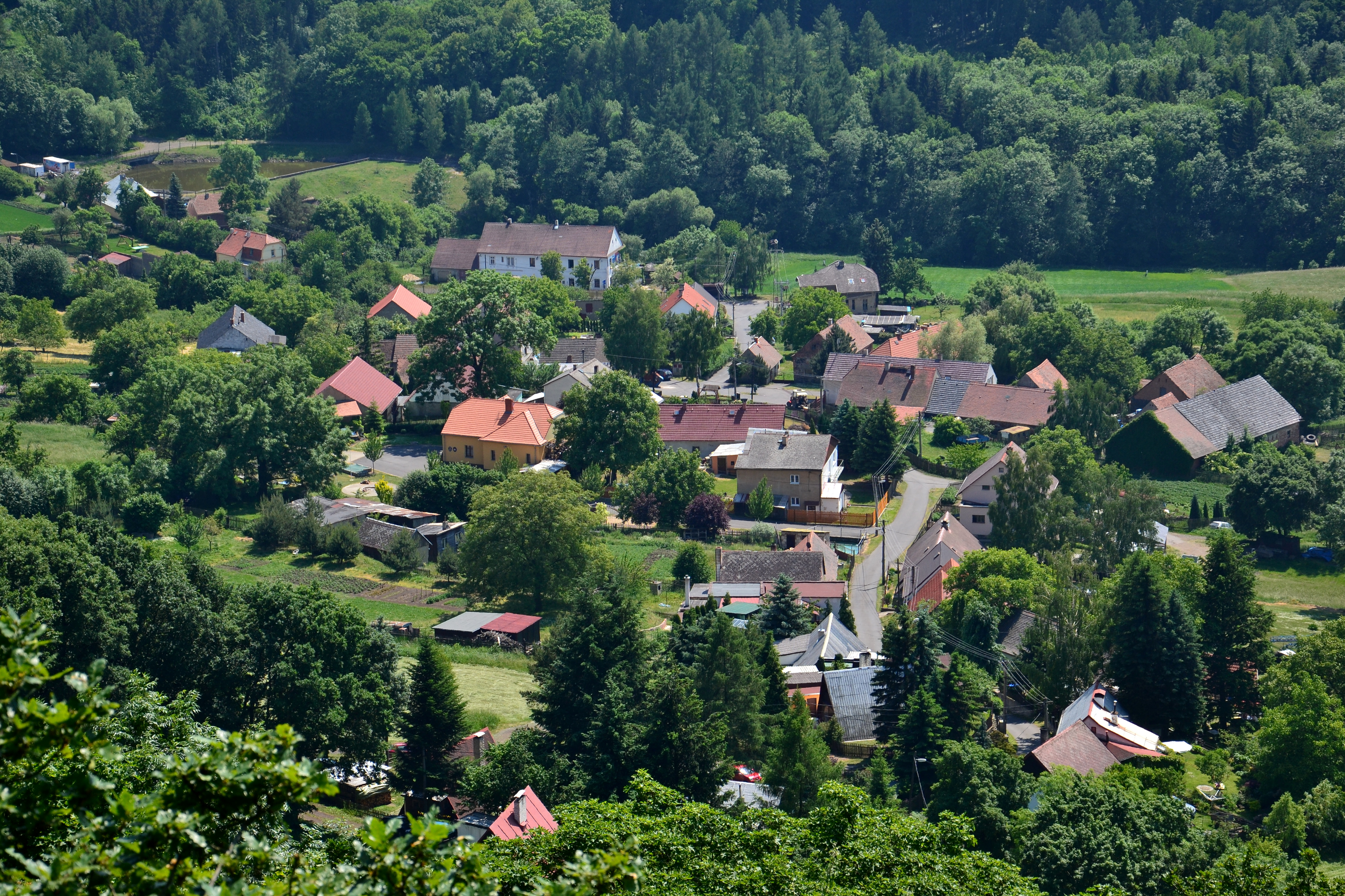 Celkový pohled z přírodní památky Štěpánovská hora